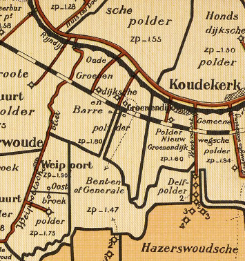 Polder Groenendijk